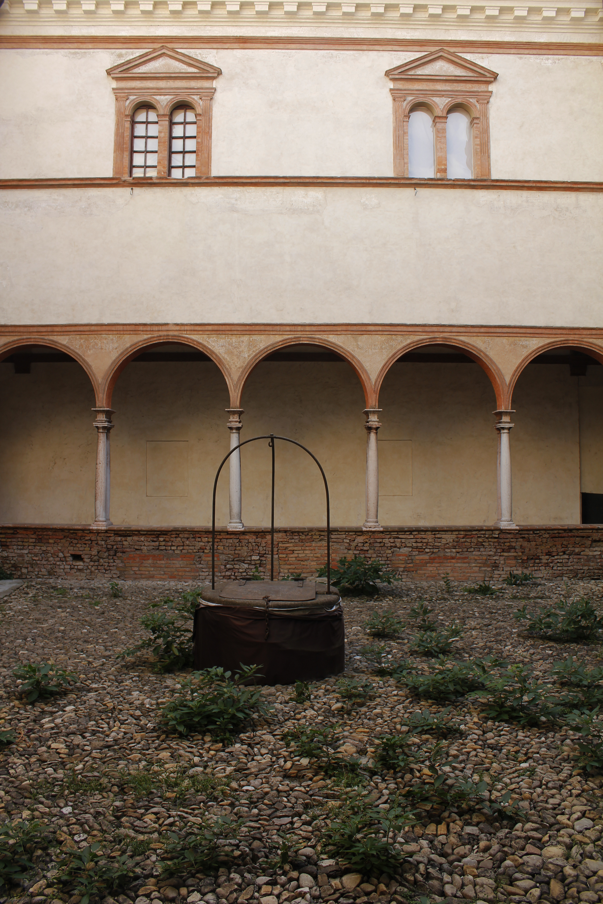 Chiostri di San Pietro This is a photo of a monument which is part of cultural heritage of Italy.